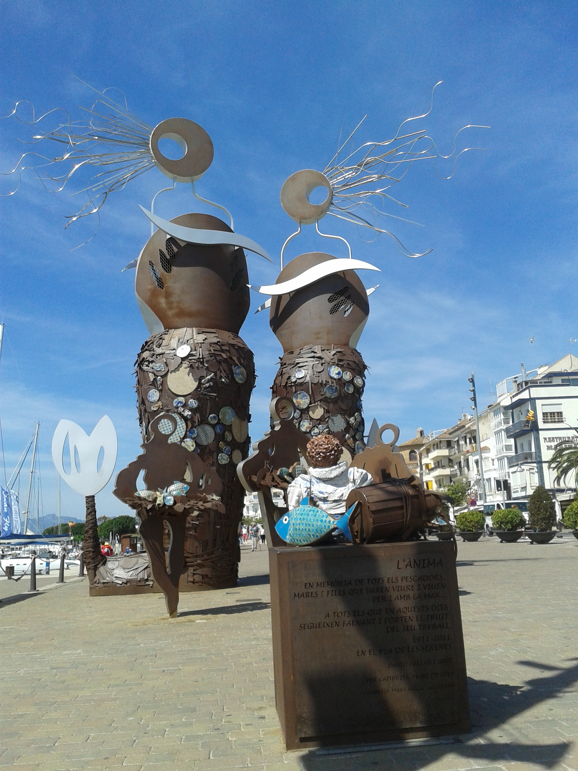 conjunto escultorico ubicado en el puerto de Cambrils